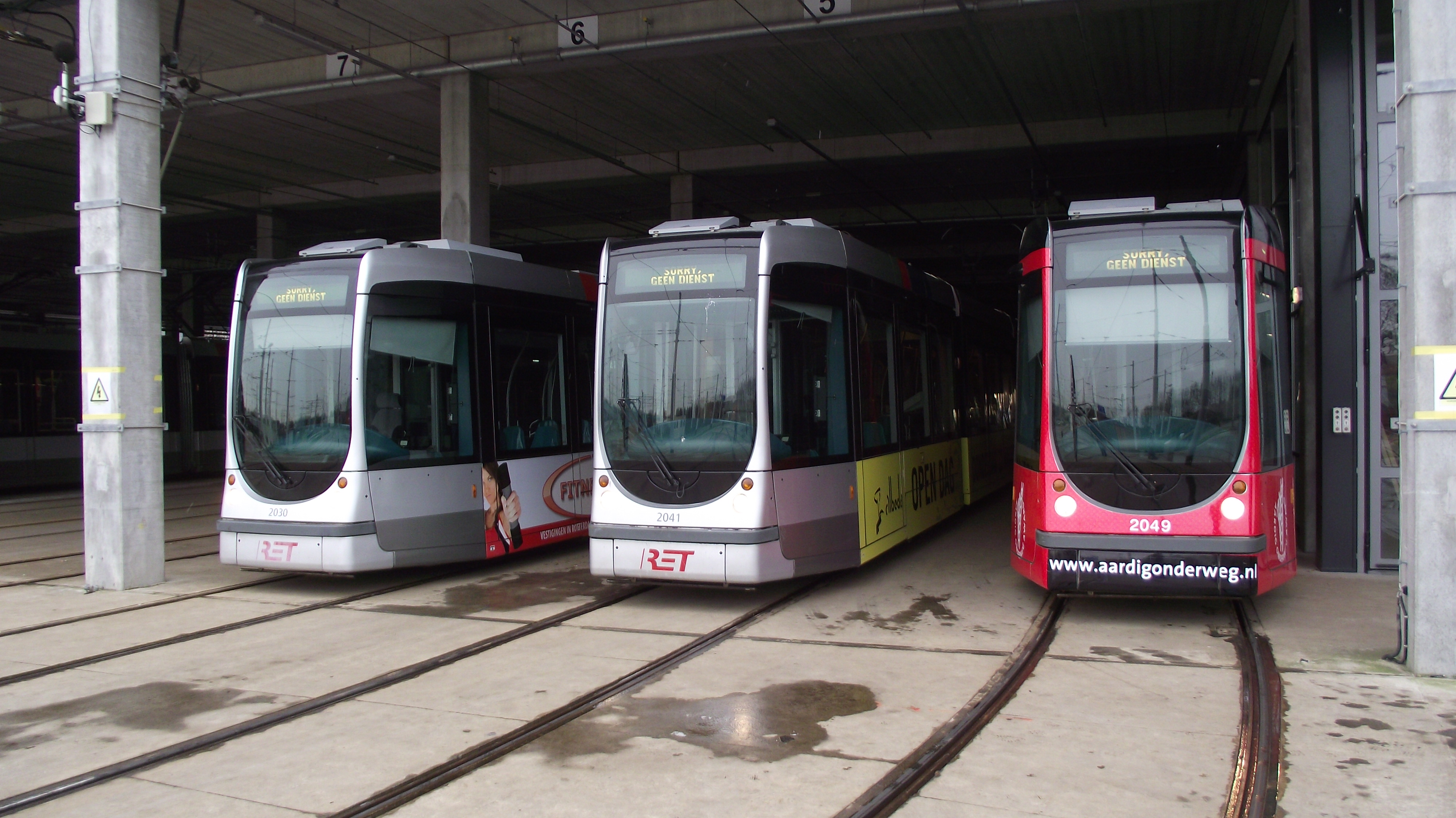 Trams opgesteld bij de remise